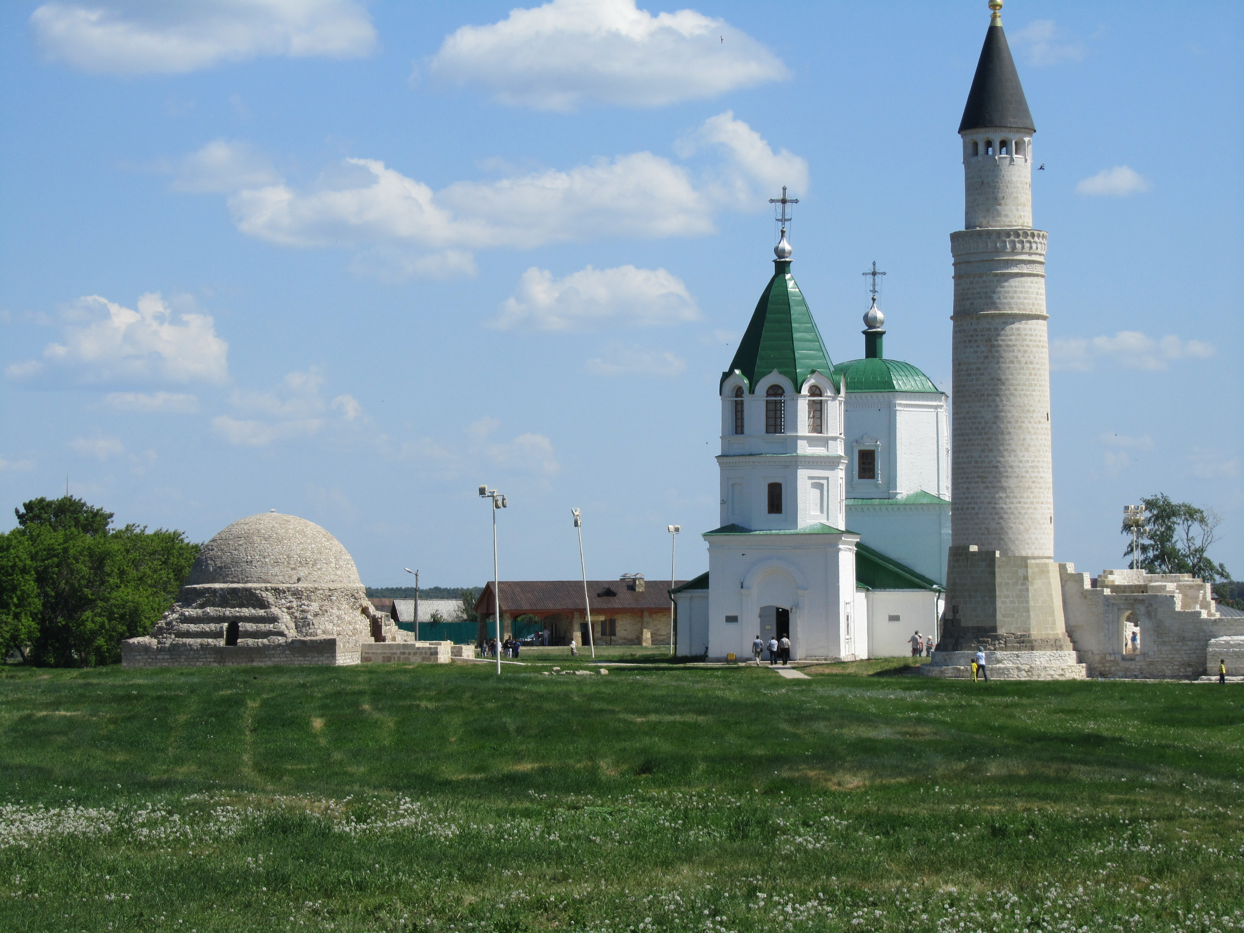 Комплекс памятников архитектуры XIII-XIV вв. на территории Булгарского городища (архитектурный комплекс «Болгары») (Республика Татарстан, Болгар, село Болгары, городище)